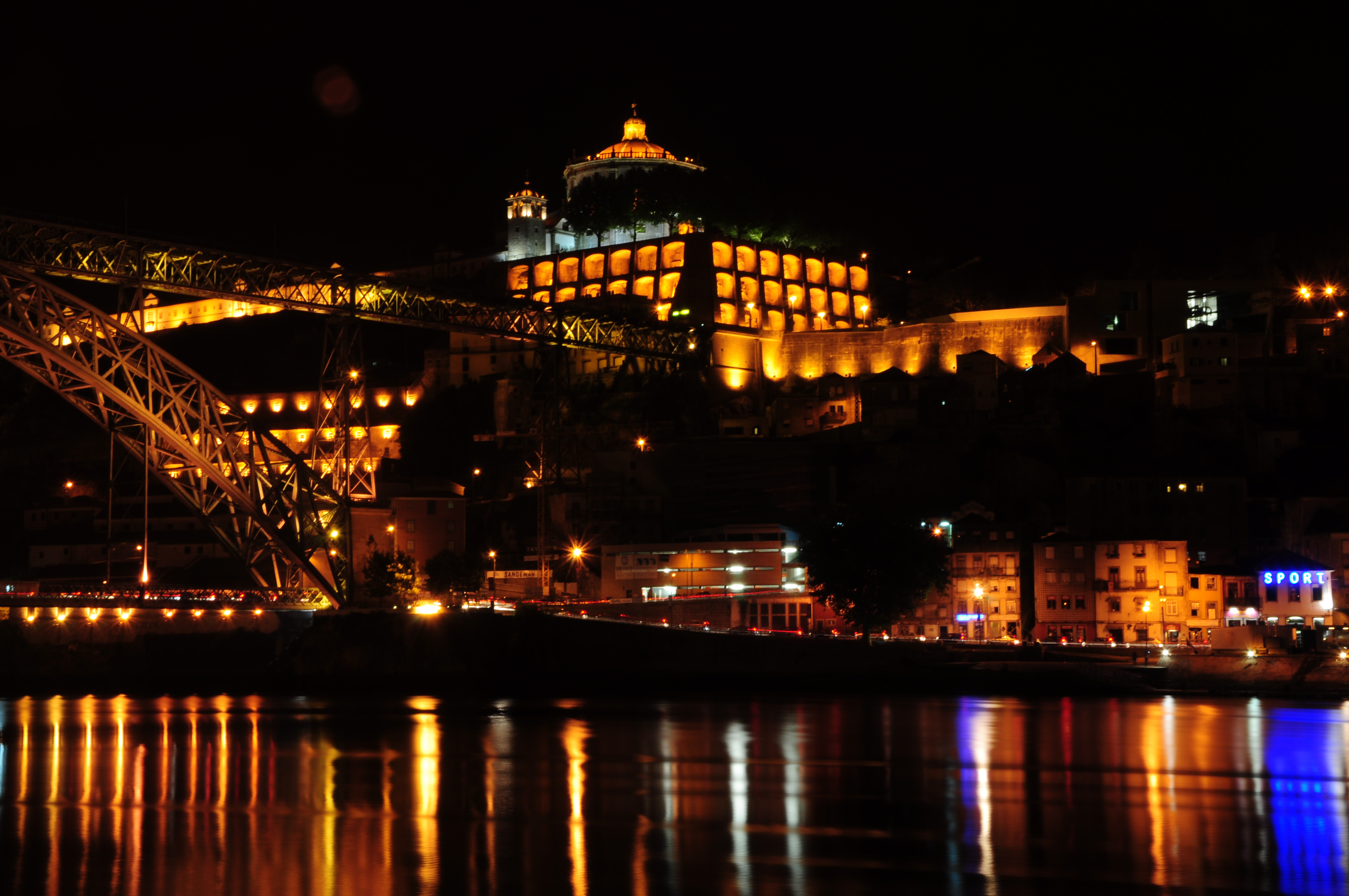 Igreja da Serra do Pilar, á noite This file was uploaded for Wiki Loves Monuments in Portugal with the unique identifier 71225.